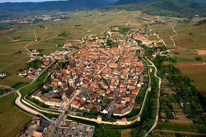 Photo aérienne de Bergheim dans le Haut-Rhin.